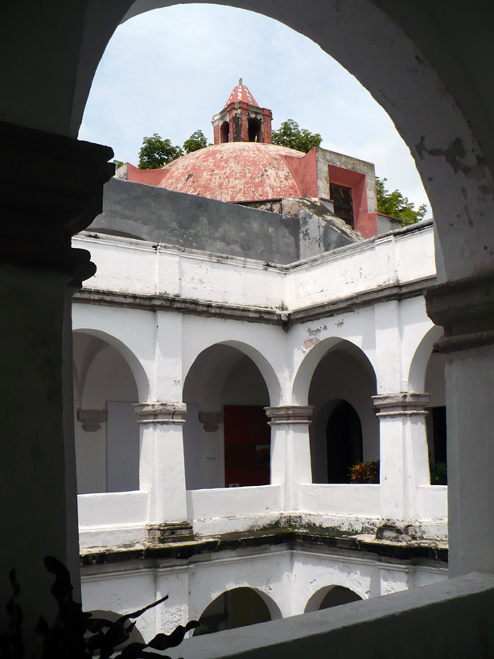 Parte alta del Convento, ahora es Museo de la Independencia Sitio de Cuautla. Cuautla, Morelos, México.